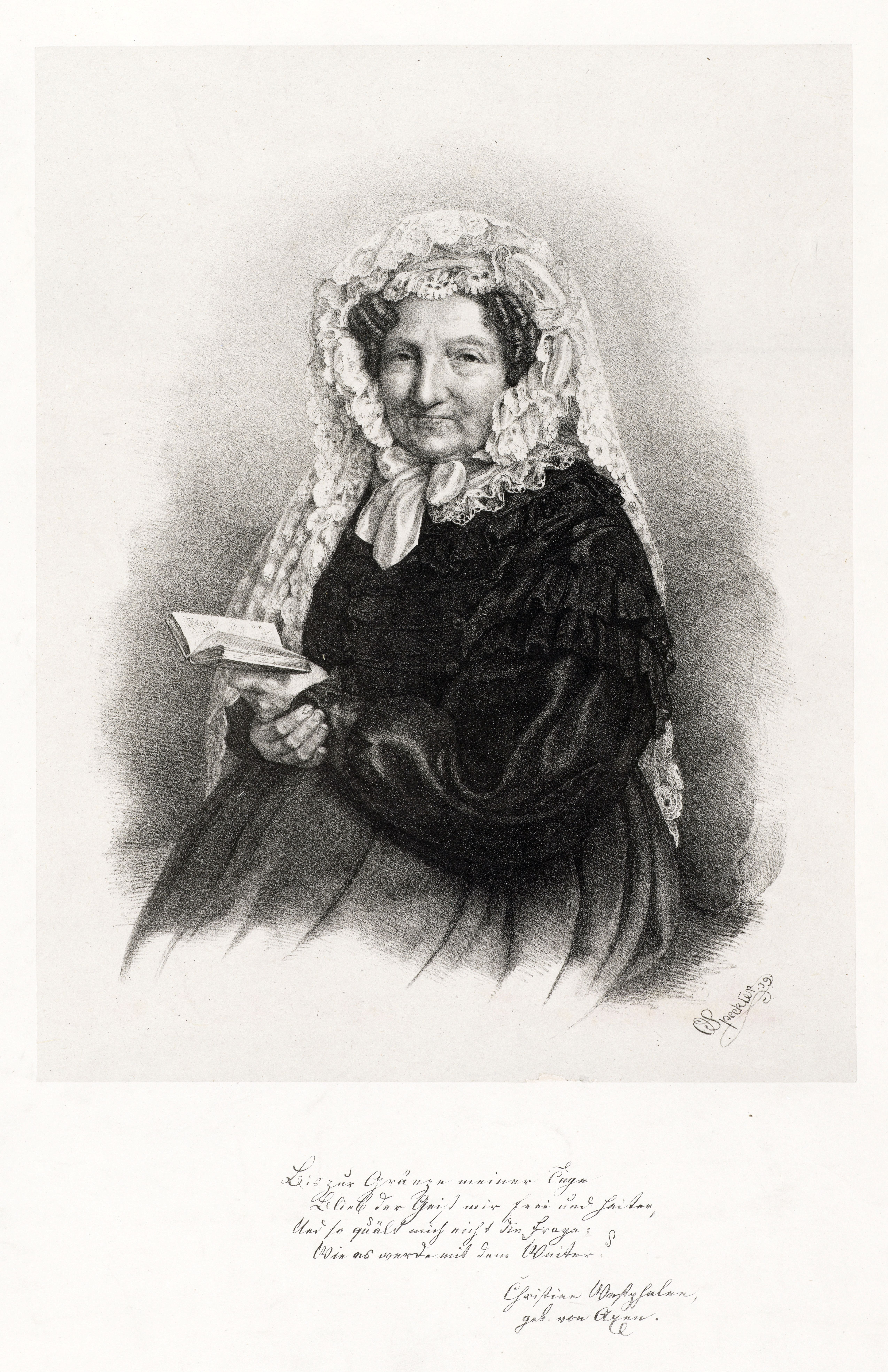 Bildnis von Christine Westphalen